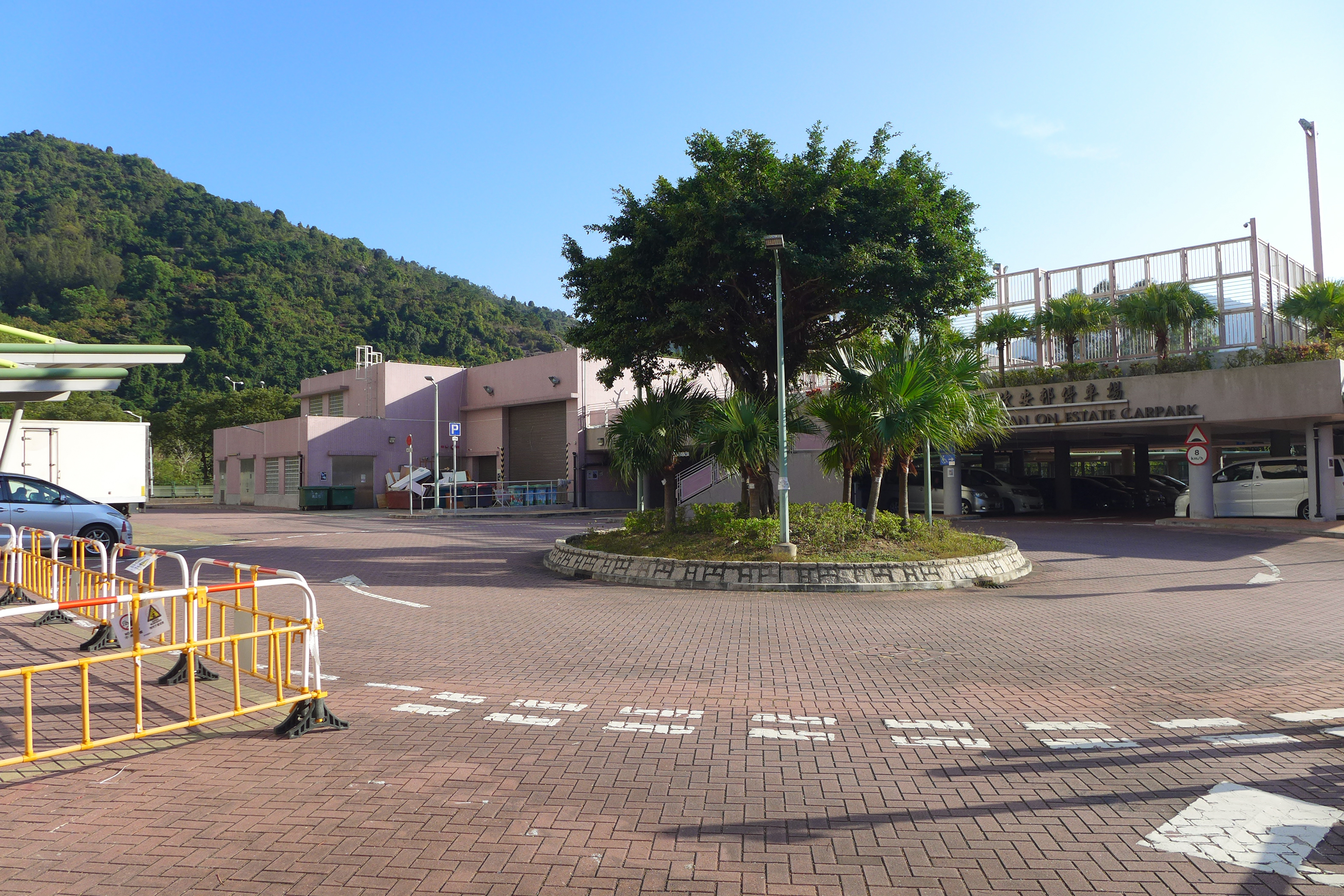 Yan On Estate Carpark